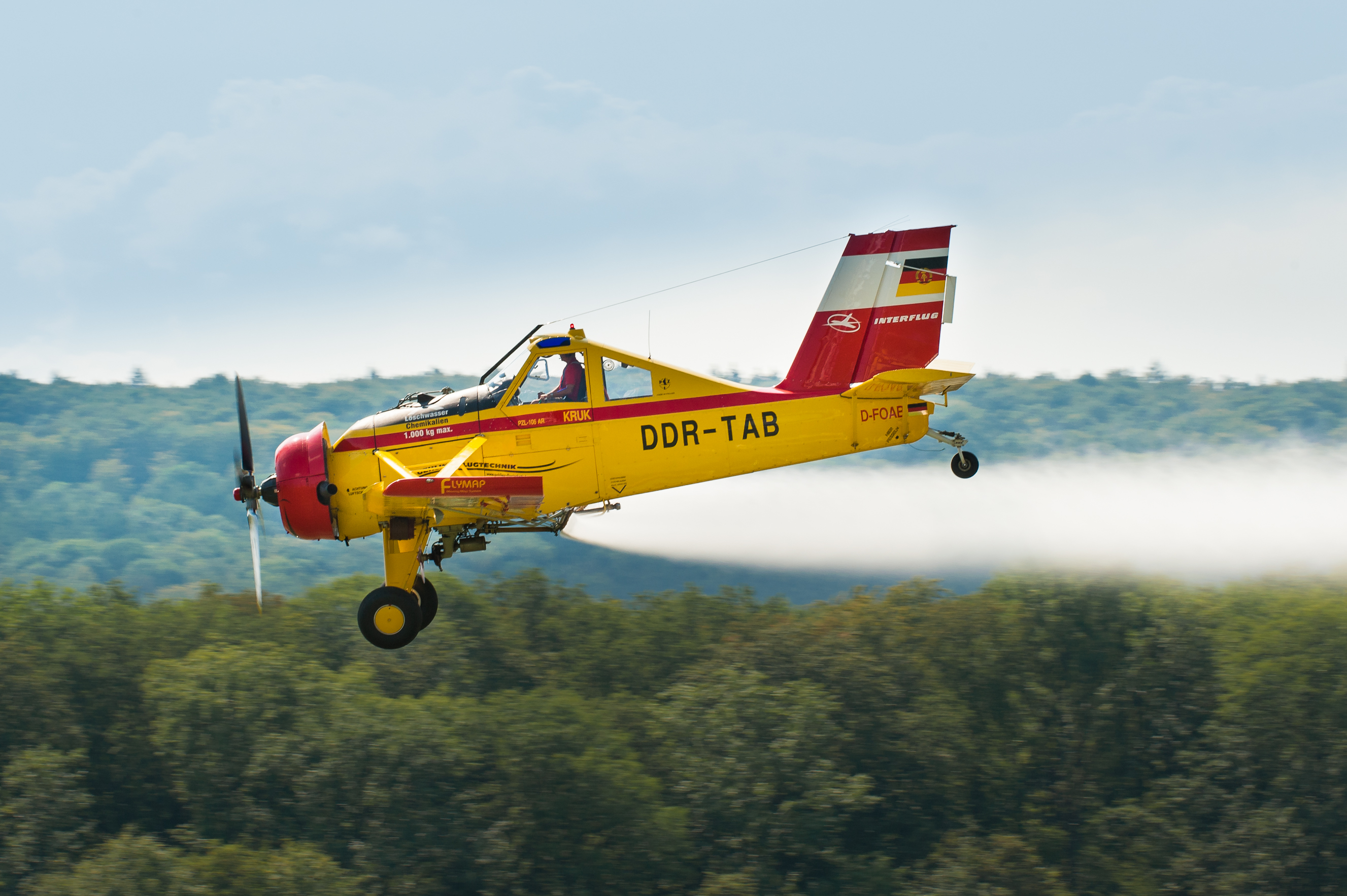 Agrarflieger Gehling PLZ-106 AR Kruk beim Oldtimer Fliegertreffen Flugfeld Hahnweide 2013